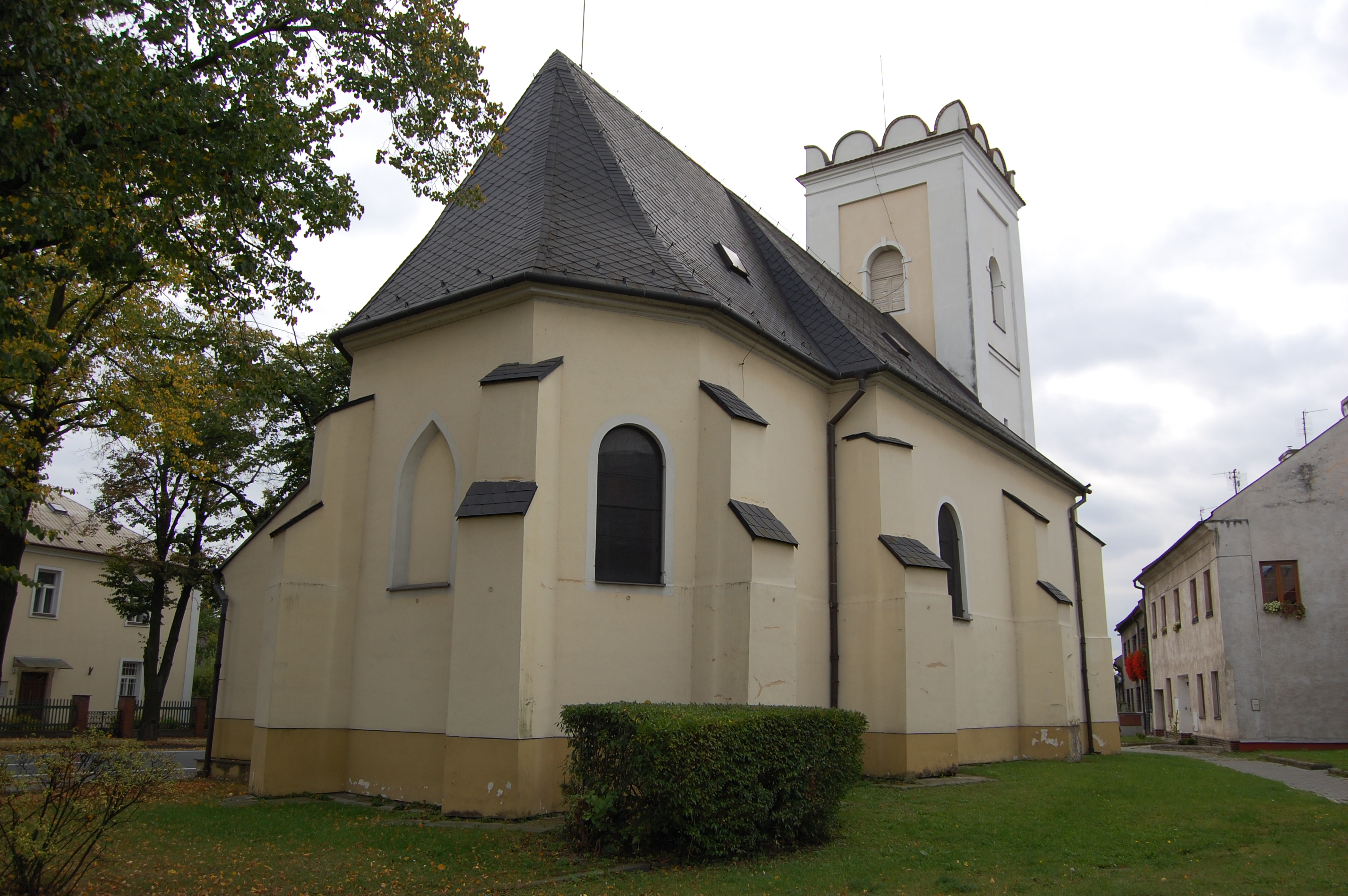 Kostel svaté Barbory - zadní pohled, Selské náměstí, Olomouc - Chválkovice